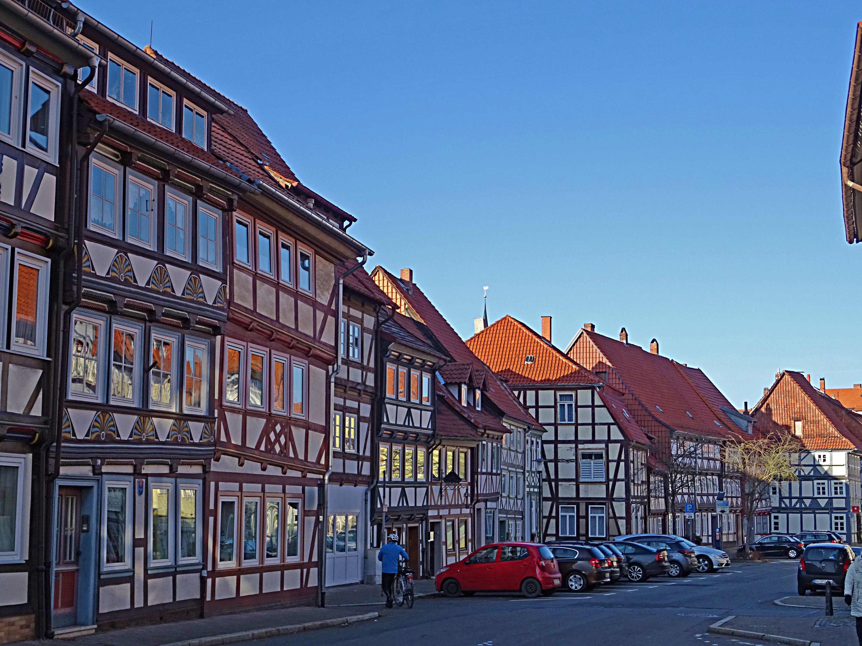 Duderstadt - Steintorstraße